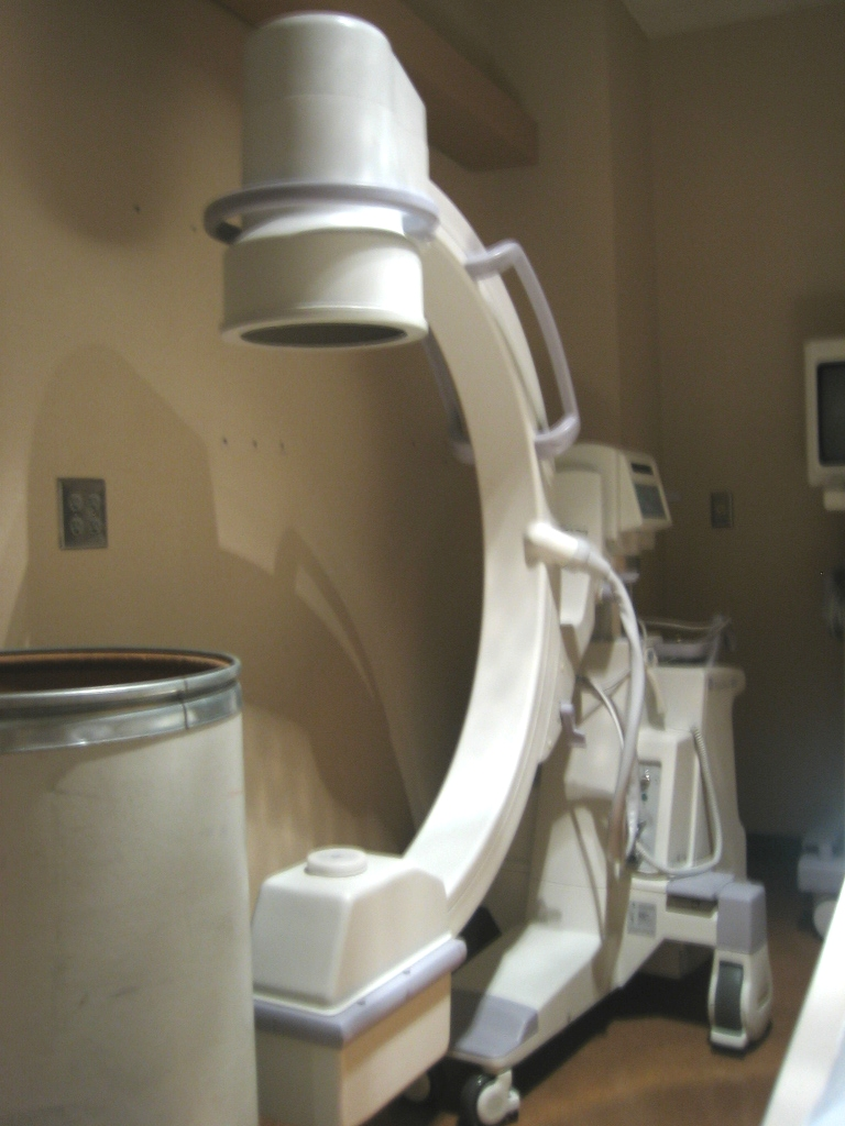 A mobile C-arm fluoroscopy unit.